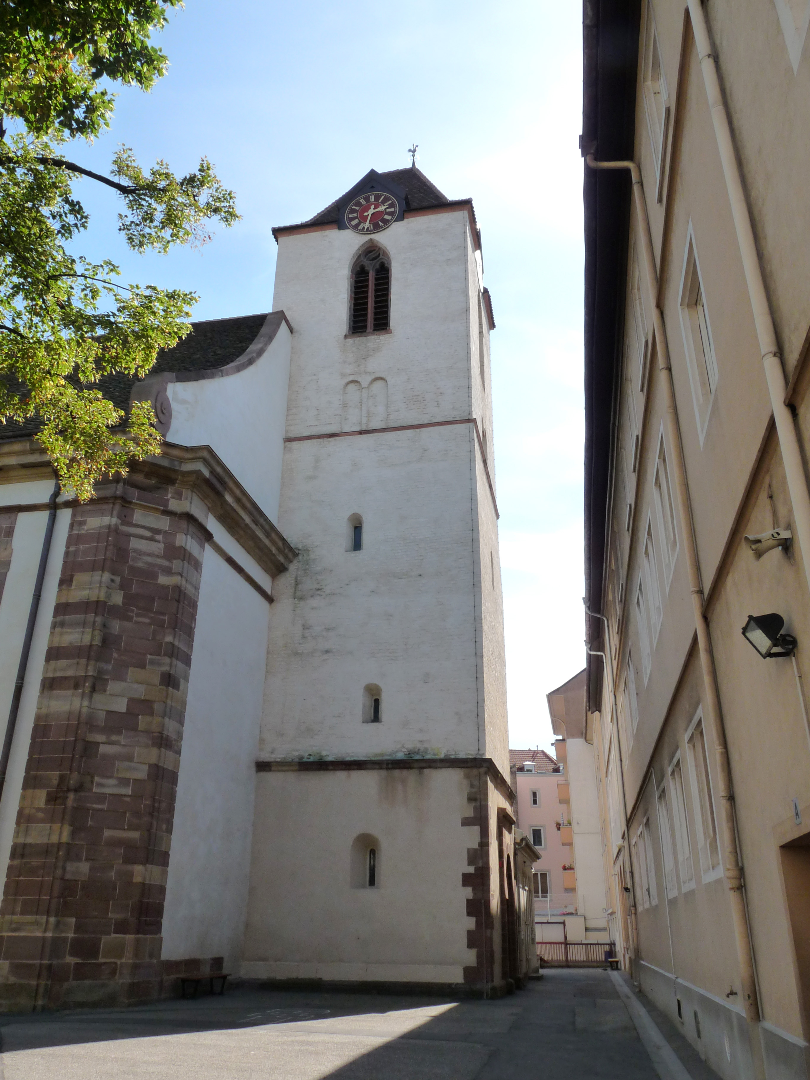 Clocher de l'église Sainte-Aurélie de Strasbourg. Horloge de Jean-Baptiste Schwilgué.